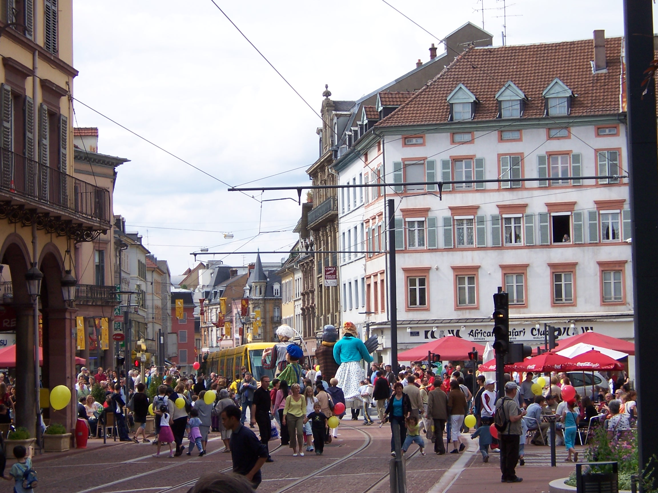 Fête pour l'inauguration du tram de Mulhouse, à la Place de la République.